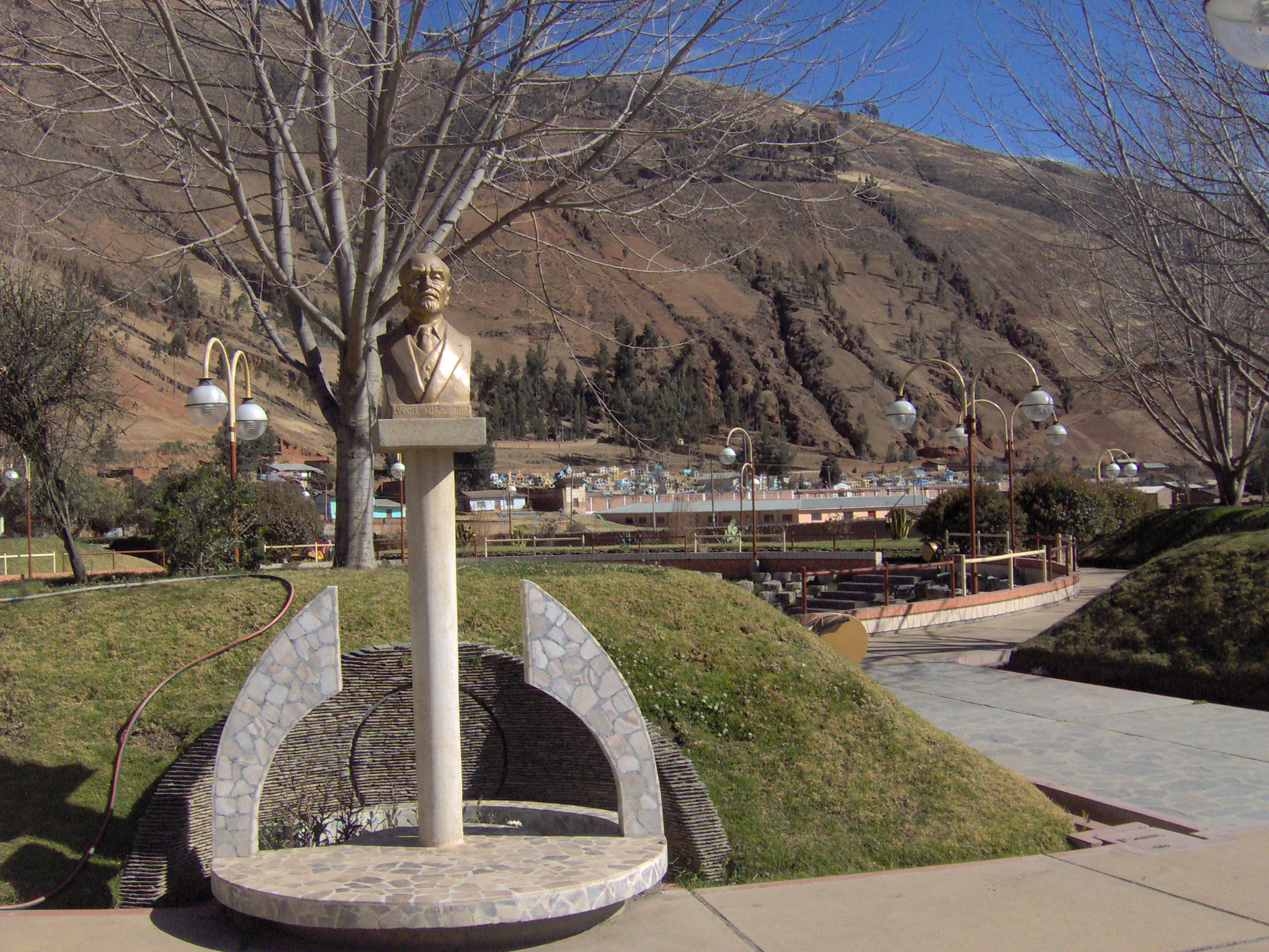 Monumento del busto del pintor peruano Daniel Hernández en el Parque Ecológico Infantil Chalampampa.